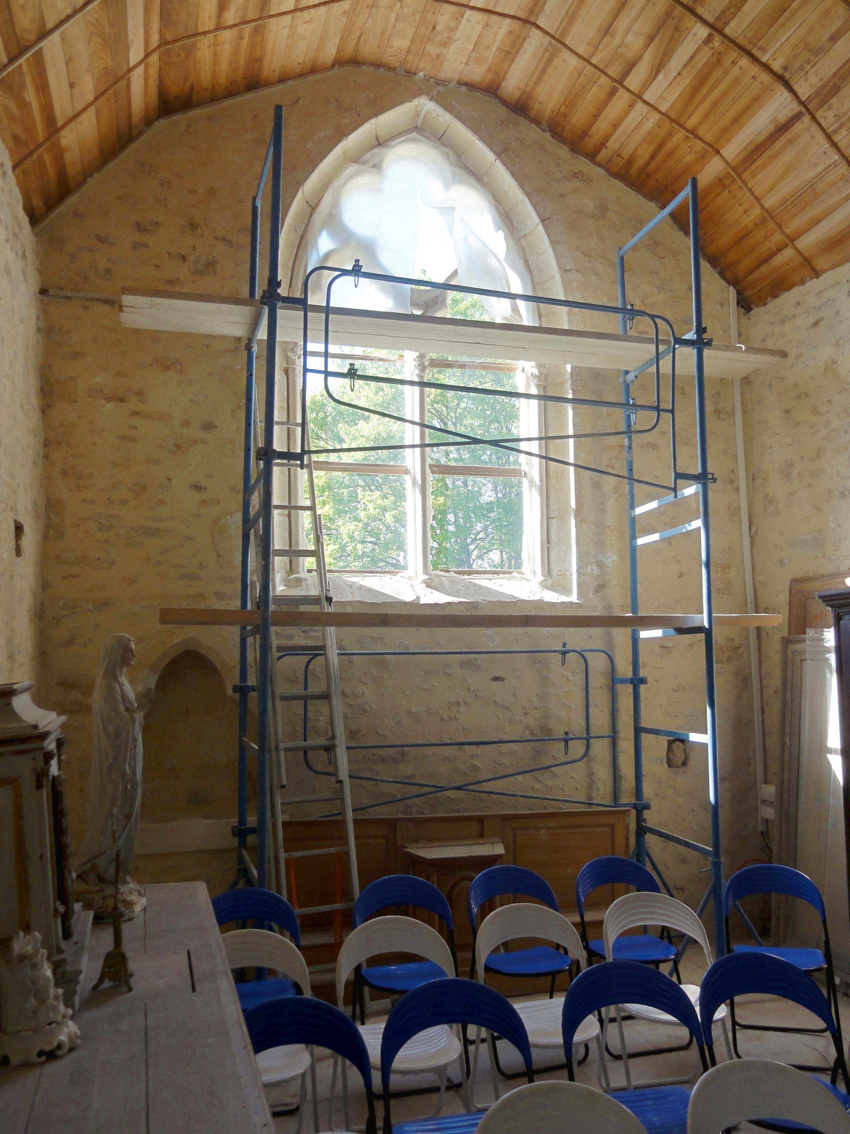 Intérieur de l'église - voir tire.